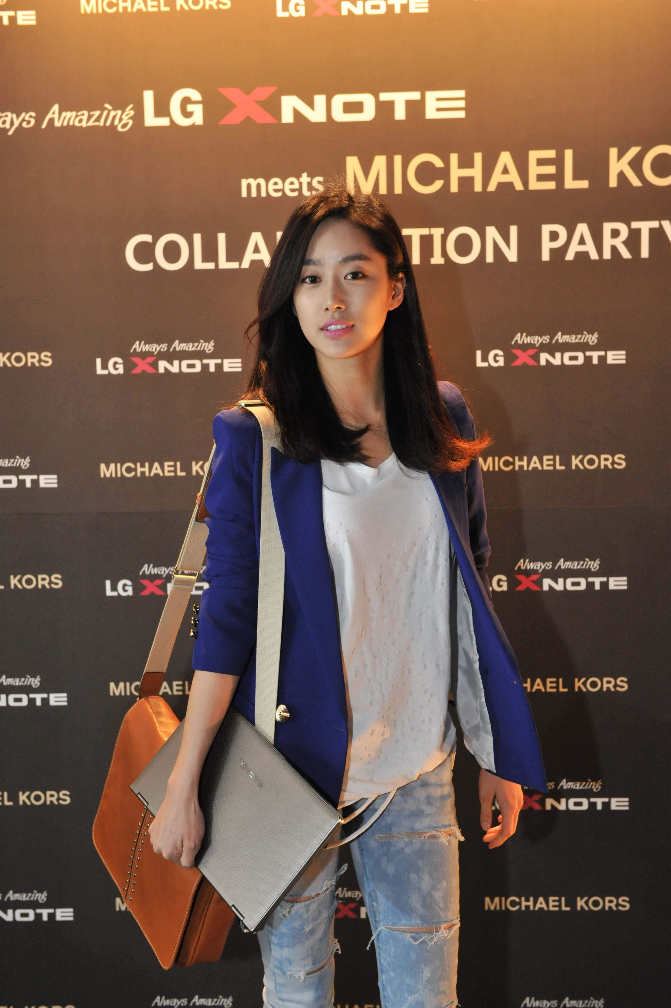 엑스노트 마이클 코어스 에디션 론칭 행사에 참석한 전혜빈 '엑스노트 마이클 코어스 에디션' 런칭 행사는 스타일링 클래서, 영상쇼, 패션쇼 등 다채로운 프로그램이 마련됐으며, 특히 황정음, 김하늘, 박한별 등 정상급 연예인과 장윤주, 송경아, 한혜진 등 탑 모델들이 대거 참석해 이목을 집중시켰다.